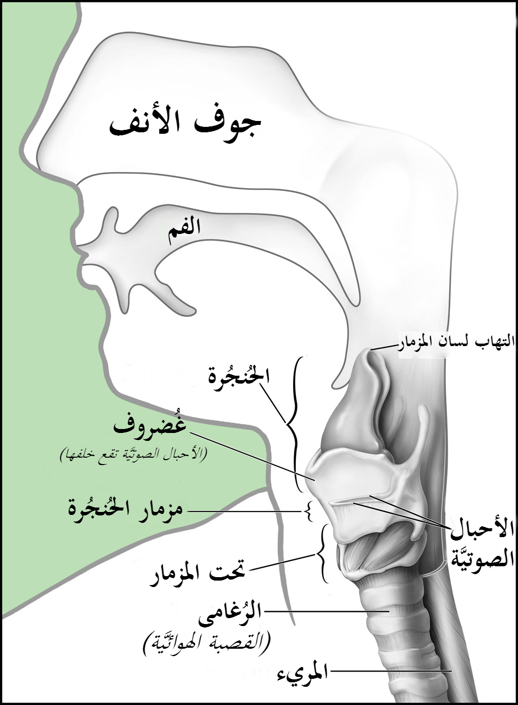 الحُنجُرة وما يقربها من أعضاء.